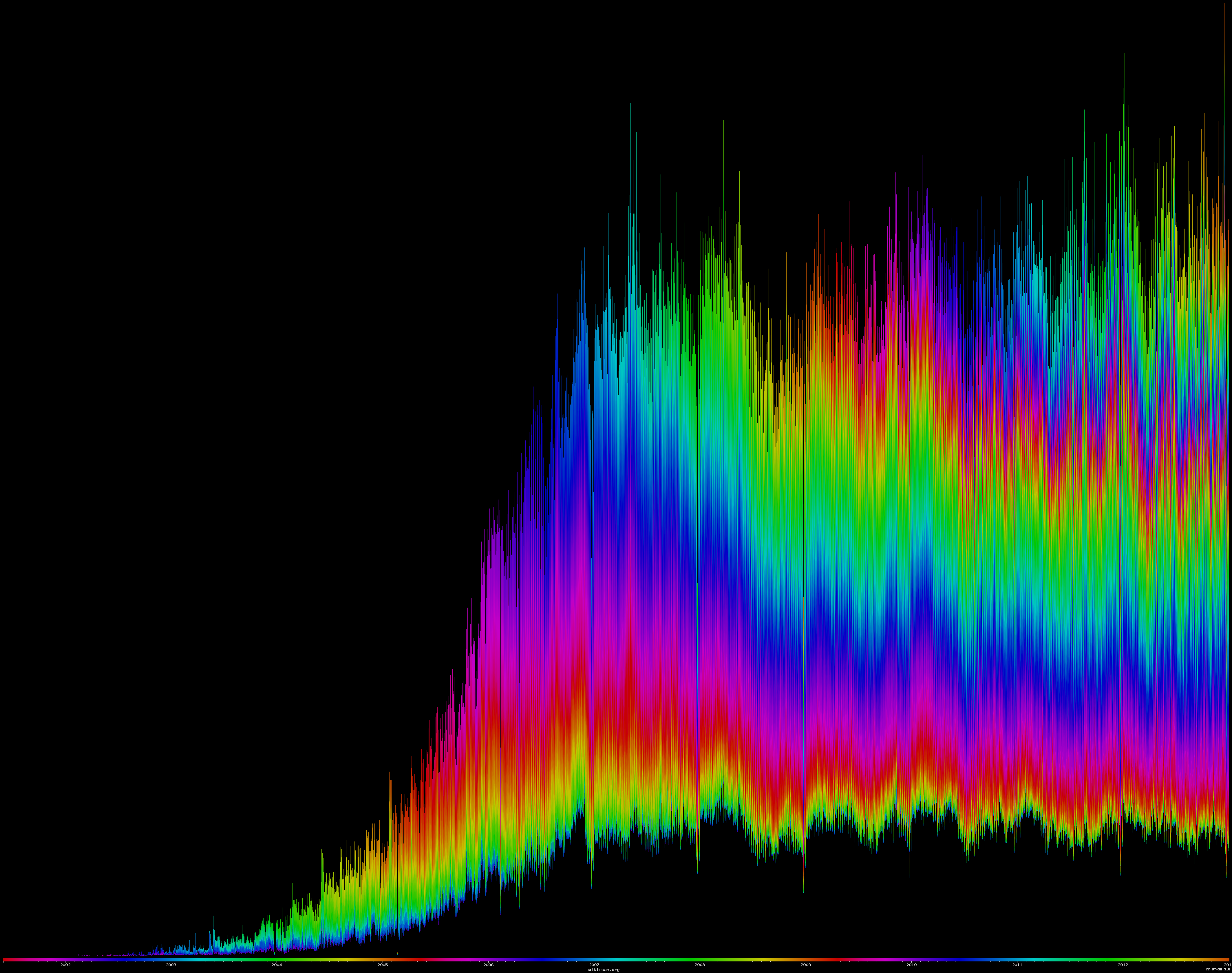 Graphe : Éditions par jour avec les IP (en noir en bas) sur Wikipédia en français 1 pixel par 10 éditions (Commentaire : on constate une stabilisation du nombre des contributions depuis 2007 et le fait que les adresses IP représentent environ 20% des éditions ; de plus, il est intéressant de souligner que les Wikipédiens arrivés entre 2005 et 2008 - représentant 30% du total des utilisateurs enregistrés - réalisaient pratiquement la moitié des éditions opérées sur WPFR en janvier 2013)